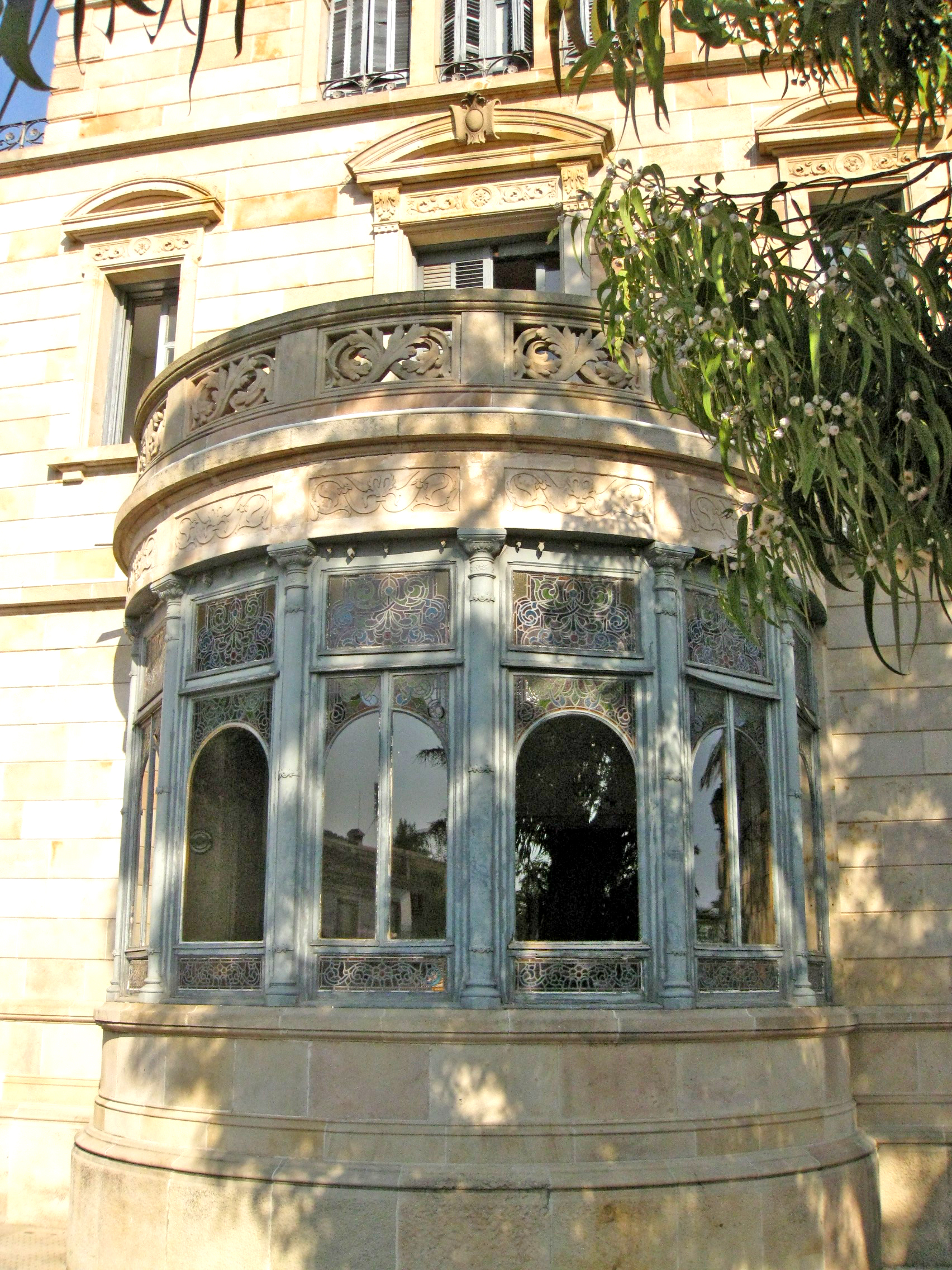 Casa Marsans, edifici de Juli Marial i Tey (1907), al passeig de la Mare de Déu del Coll núm. 41-51, al barri de Vallcarca de Barcelona. Actualment acull l'alberg juvenil Mare de Déu de Montserrat. Vista de la tribuna semicircular, a la façana sud.